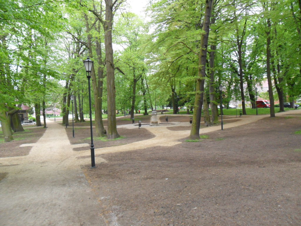 Gubin, Park A. Mickiewicza